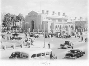 Toopkhaneh Square